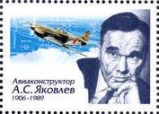 Купон из малого листа почтовых марок, посвящёных 100-летию со дня рождения А. С. Яковлева